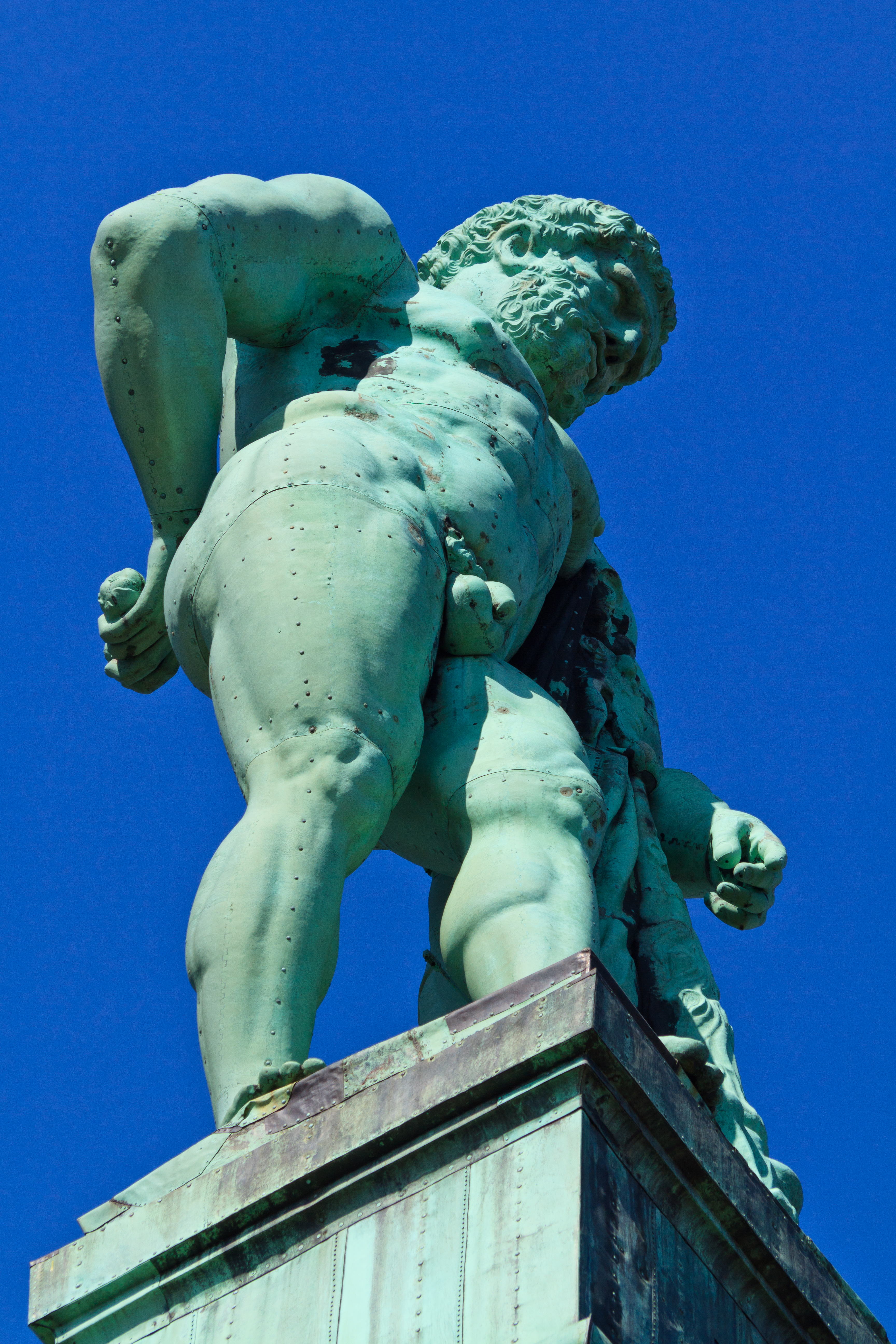 Kupferstatue des Herkules in Kassel.